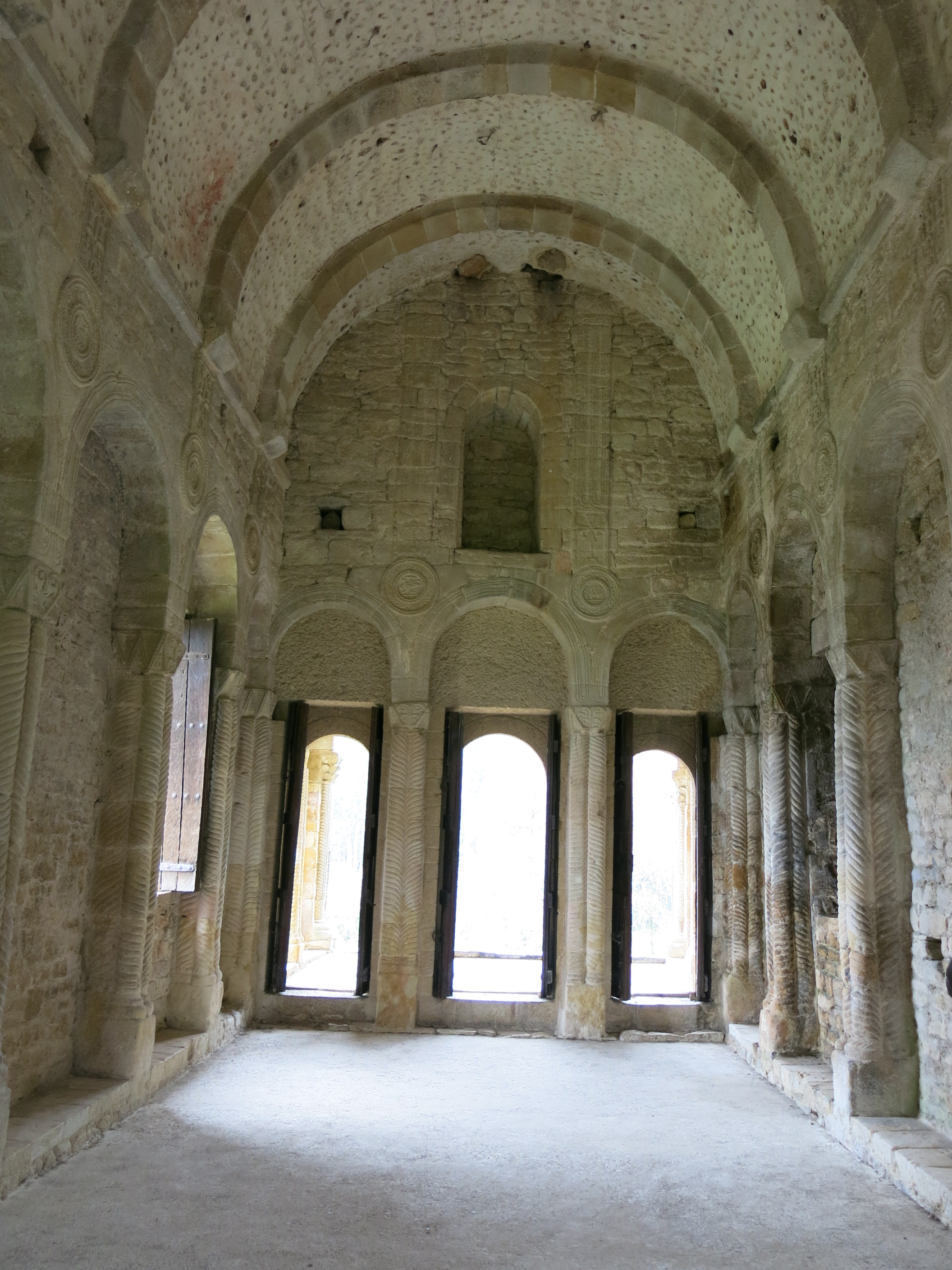 Iglesia de Santa María del Naranco